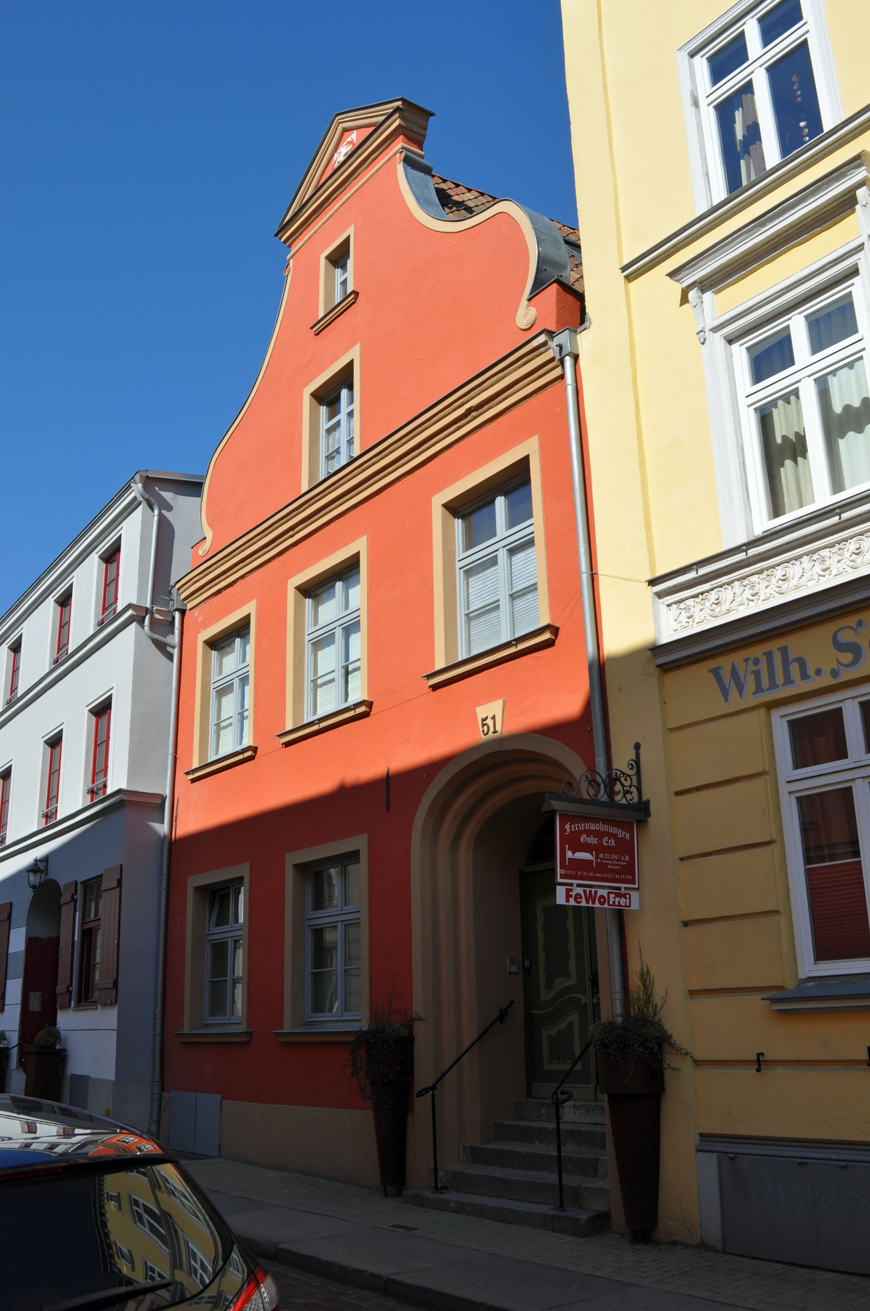 Gebäude bzw. Gebäudedetail in Stralsund. Straße und Hausnummer siehe Dateiname.